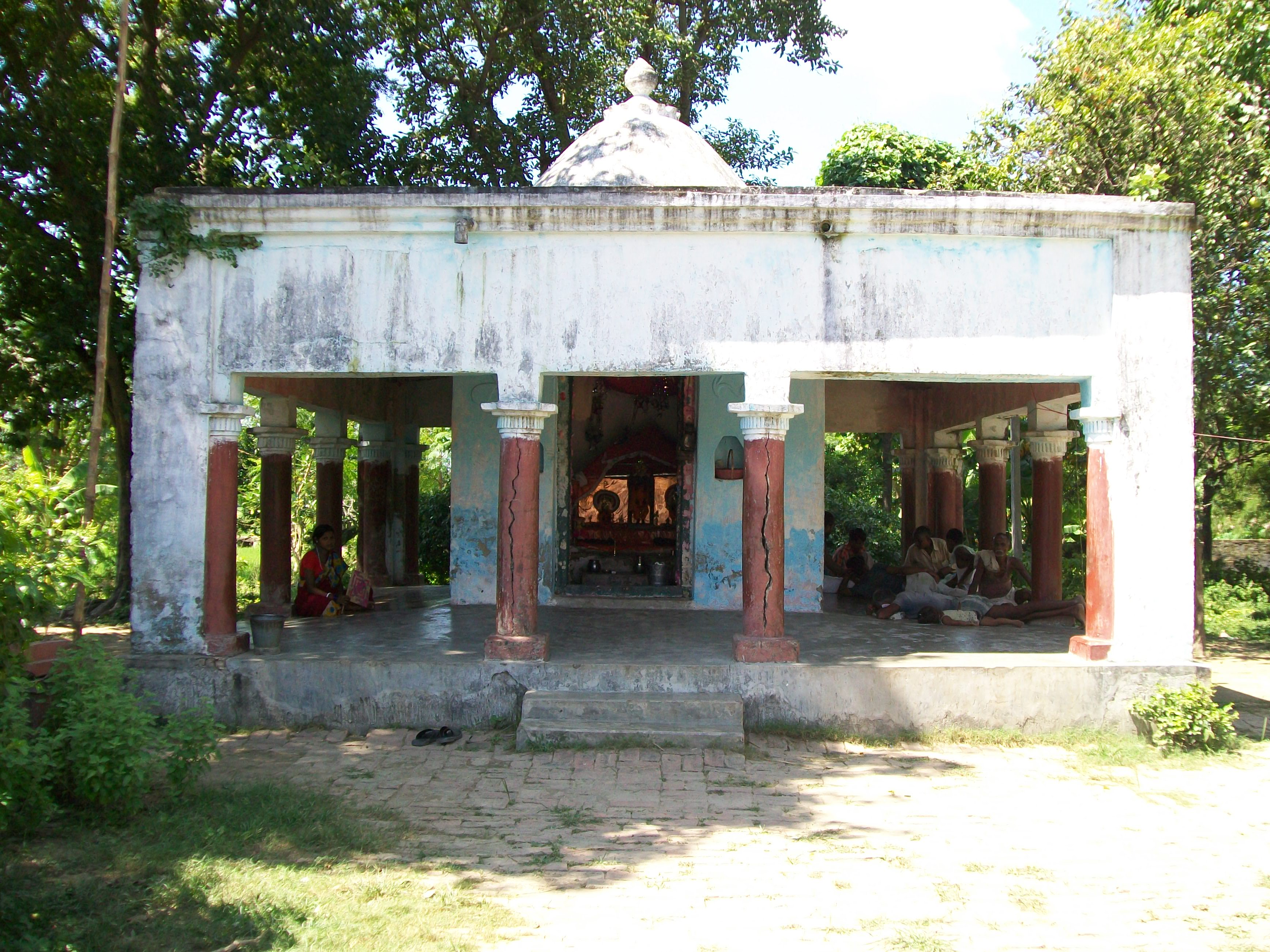 Bodhbali temple ,Sthaan